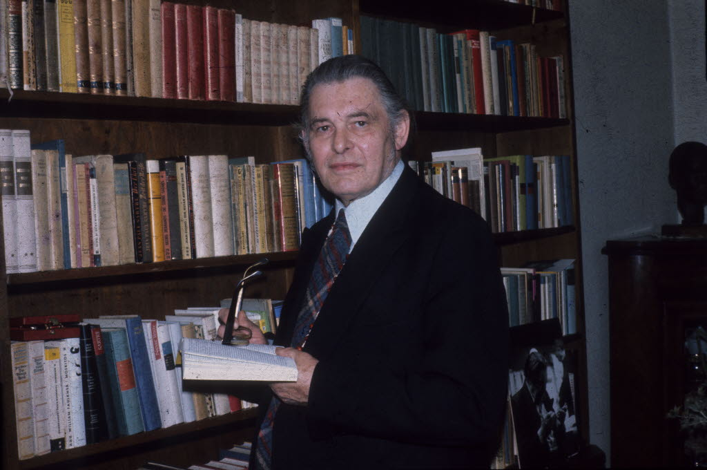 Dem Schriftsteller, Hochschullehrer und Rezitator ist wegen seiner Verdienste um die niederdeutsche Sprache die goldene Medaille der Hebbel-Gesellschaft verliehen worden.